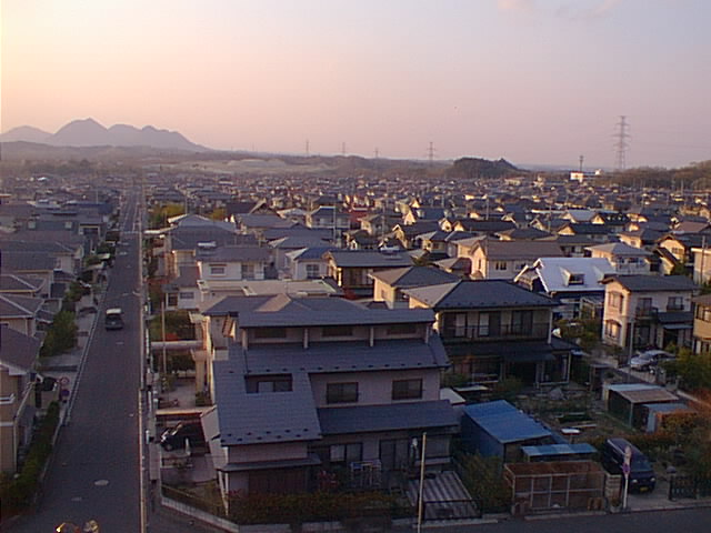 Tomiya-Town Miyagi Japan